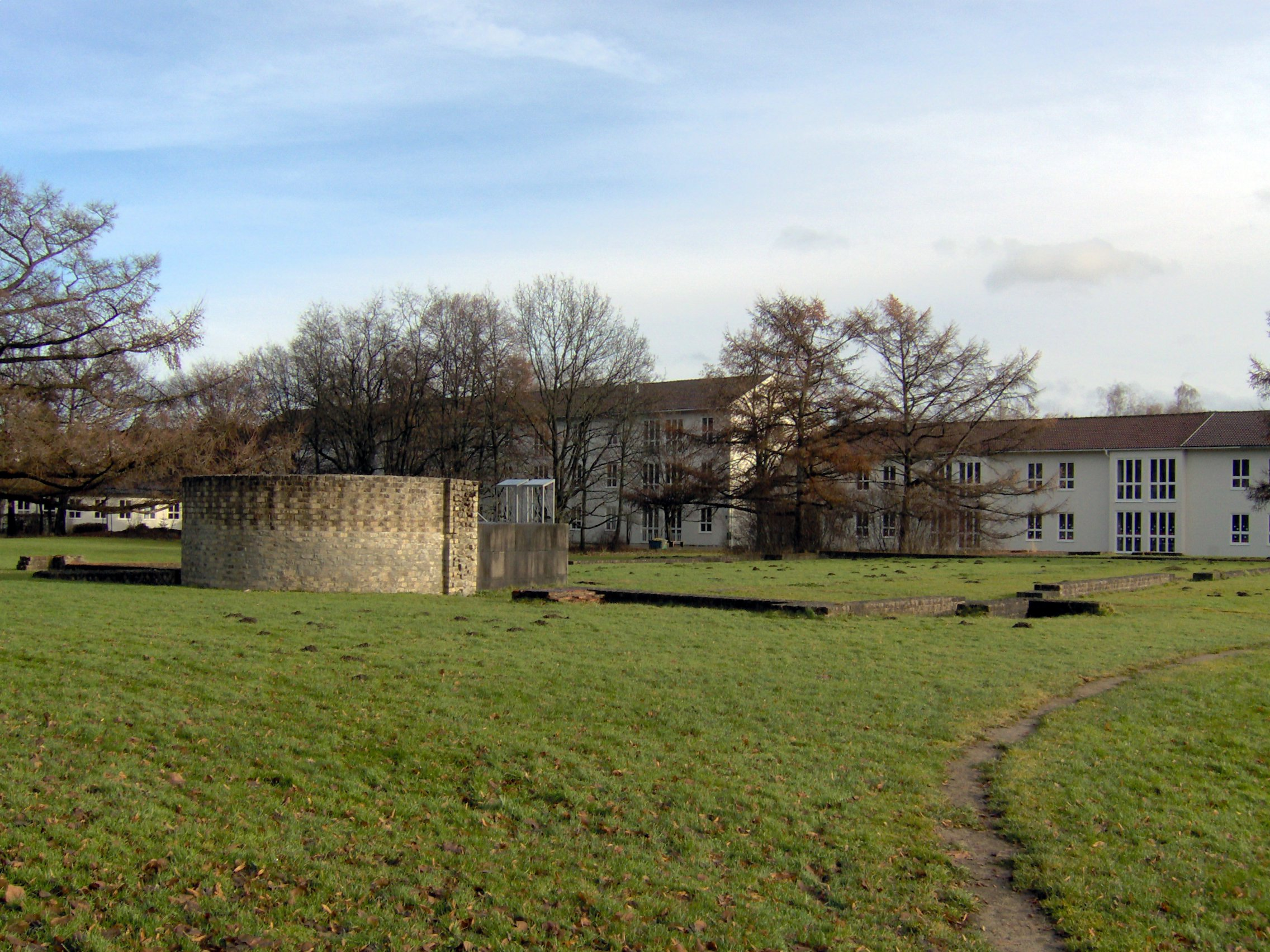 Archäologischer Park Cambodunum Kempten Basilika